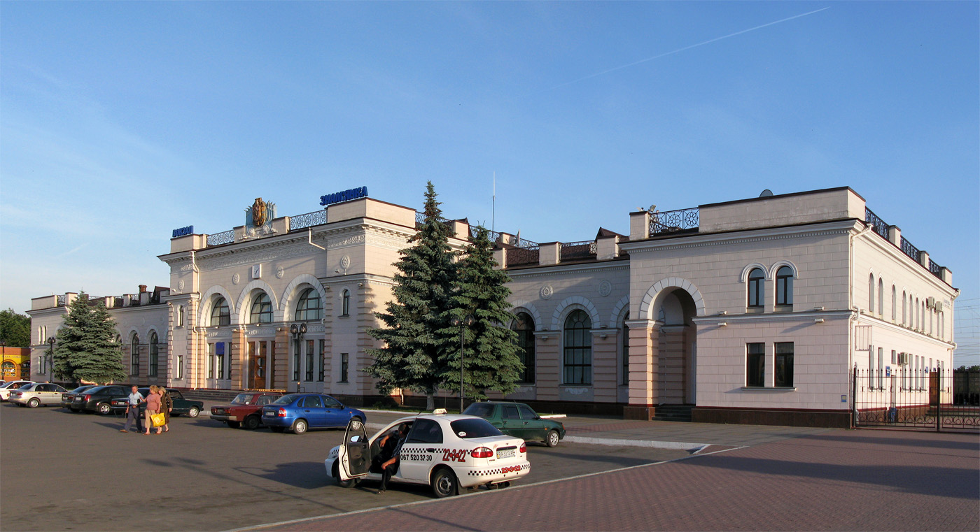 Знам'янка-Пасажирська